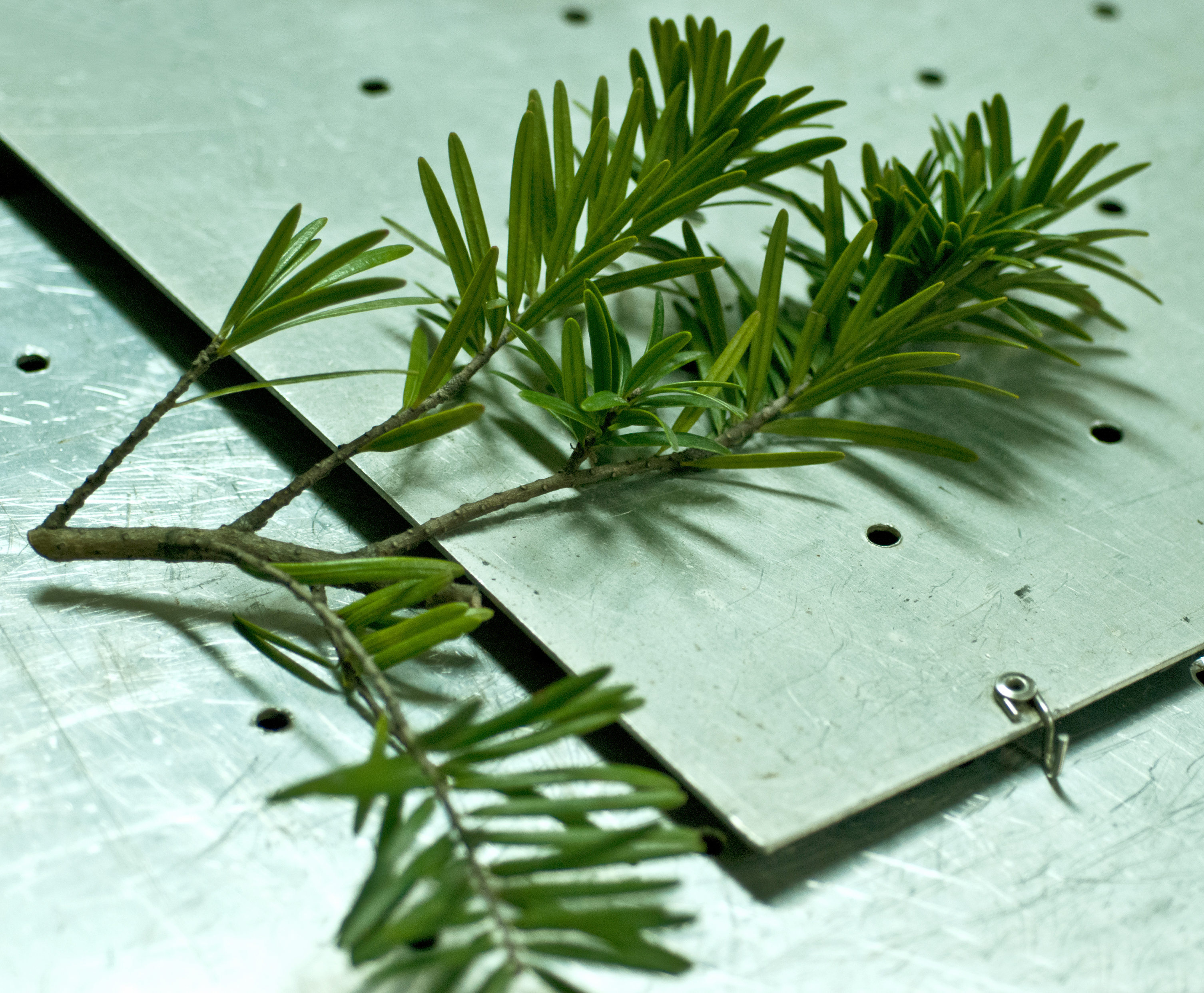 Keteleeria davidiana var. formosana foliage